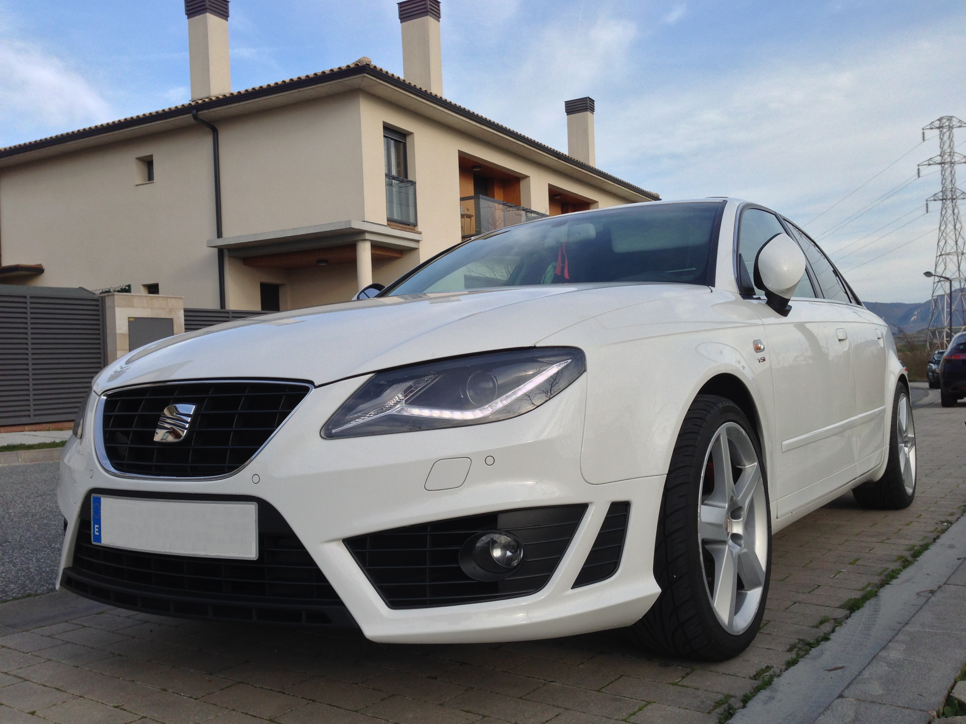 Exeo con el kit aerodinamico